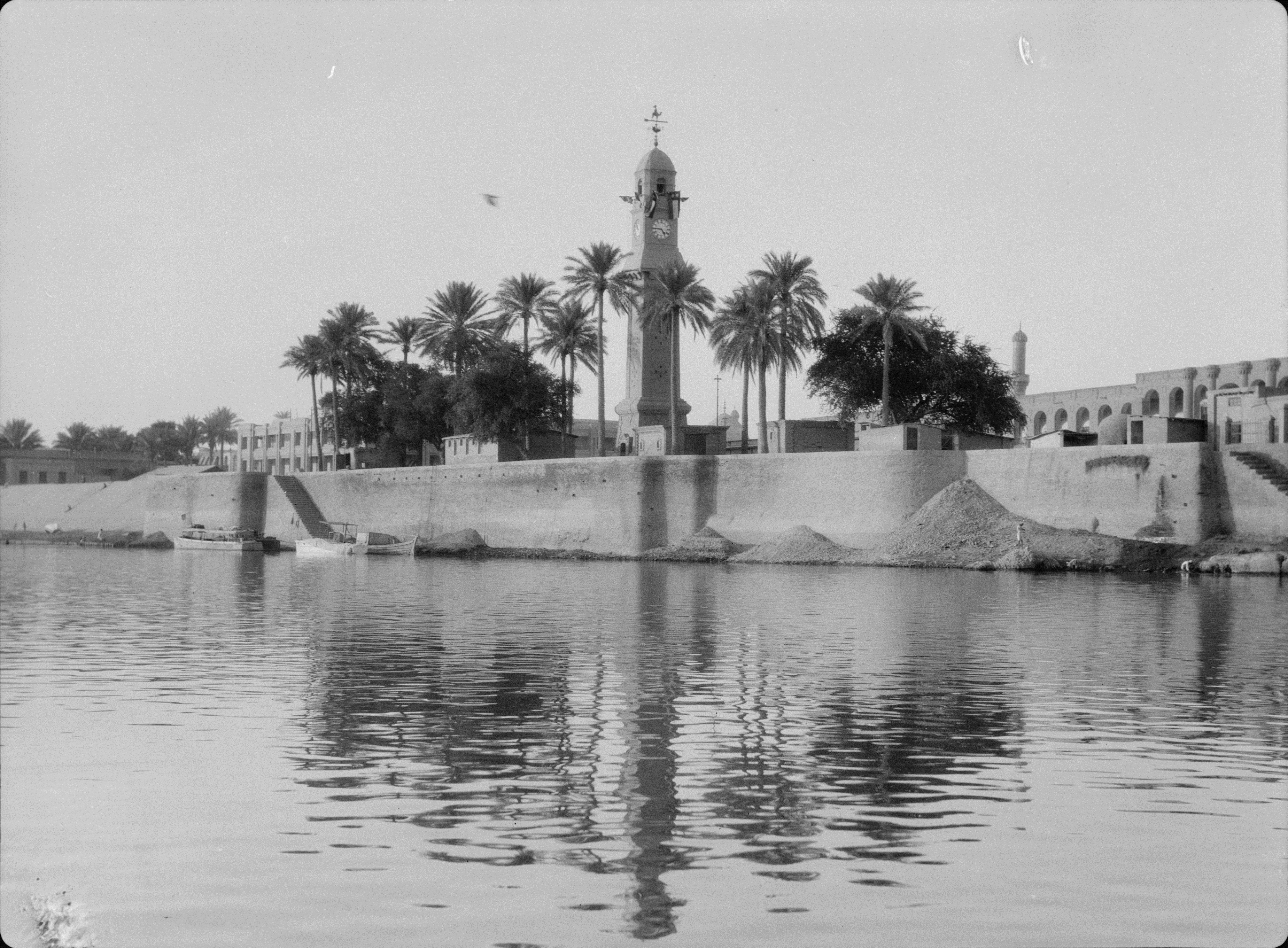 منظر مبنى القشلة على ضفة نهر دجلة في بغداد عام 1932